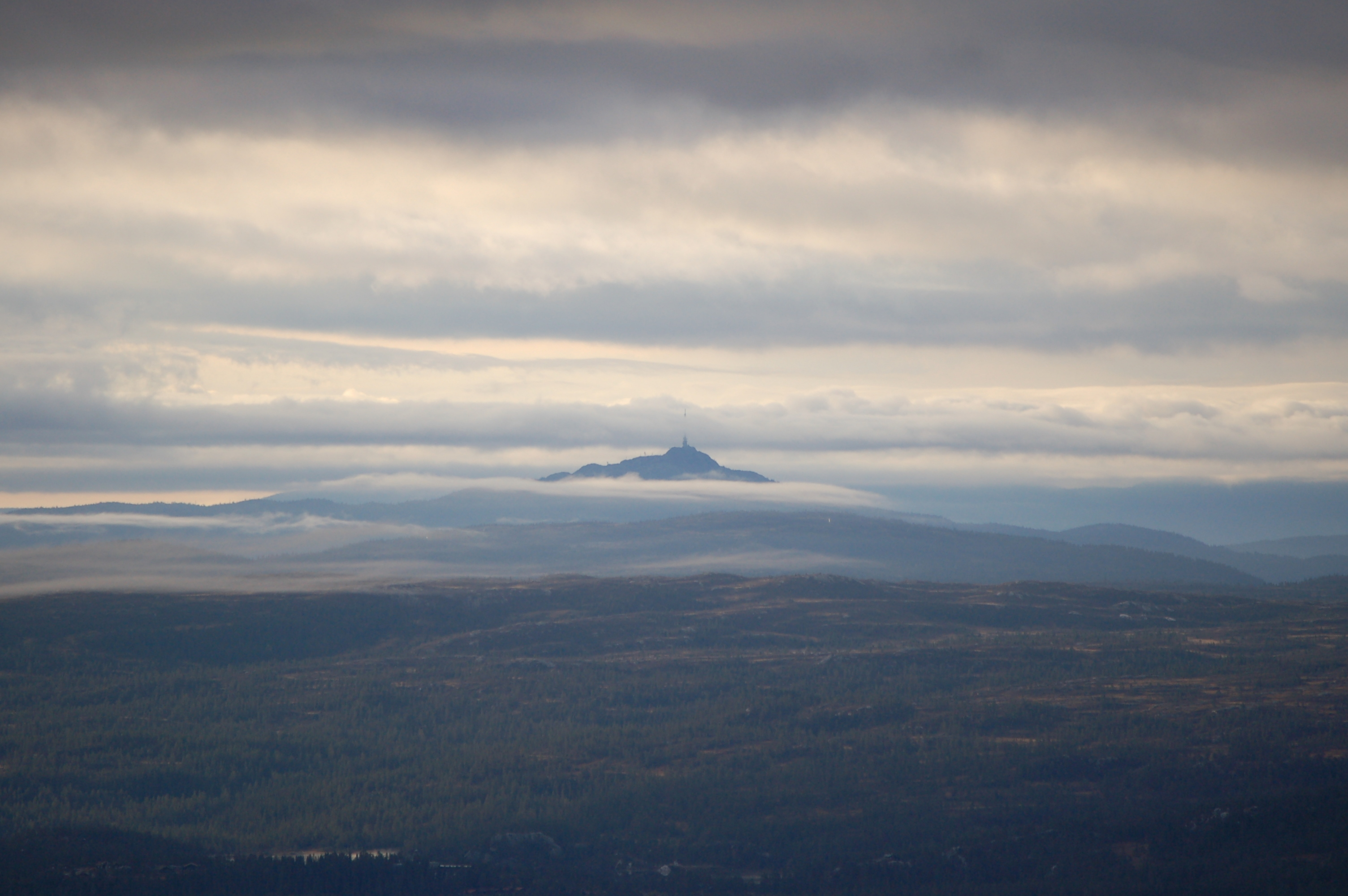 Jonsknuten (Knuten) i Kongsberg kommune. 904 moh. You are free to use this picture outside Wikipedia (see license), as long as you write: Photo: Arnstein Rønning